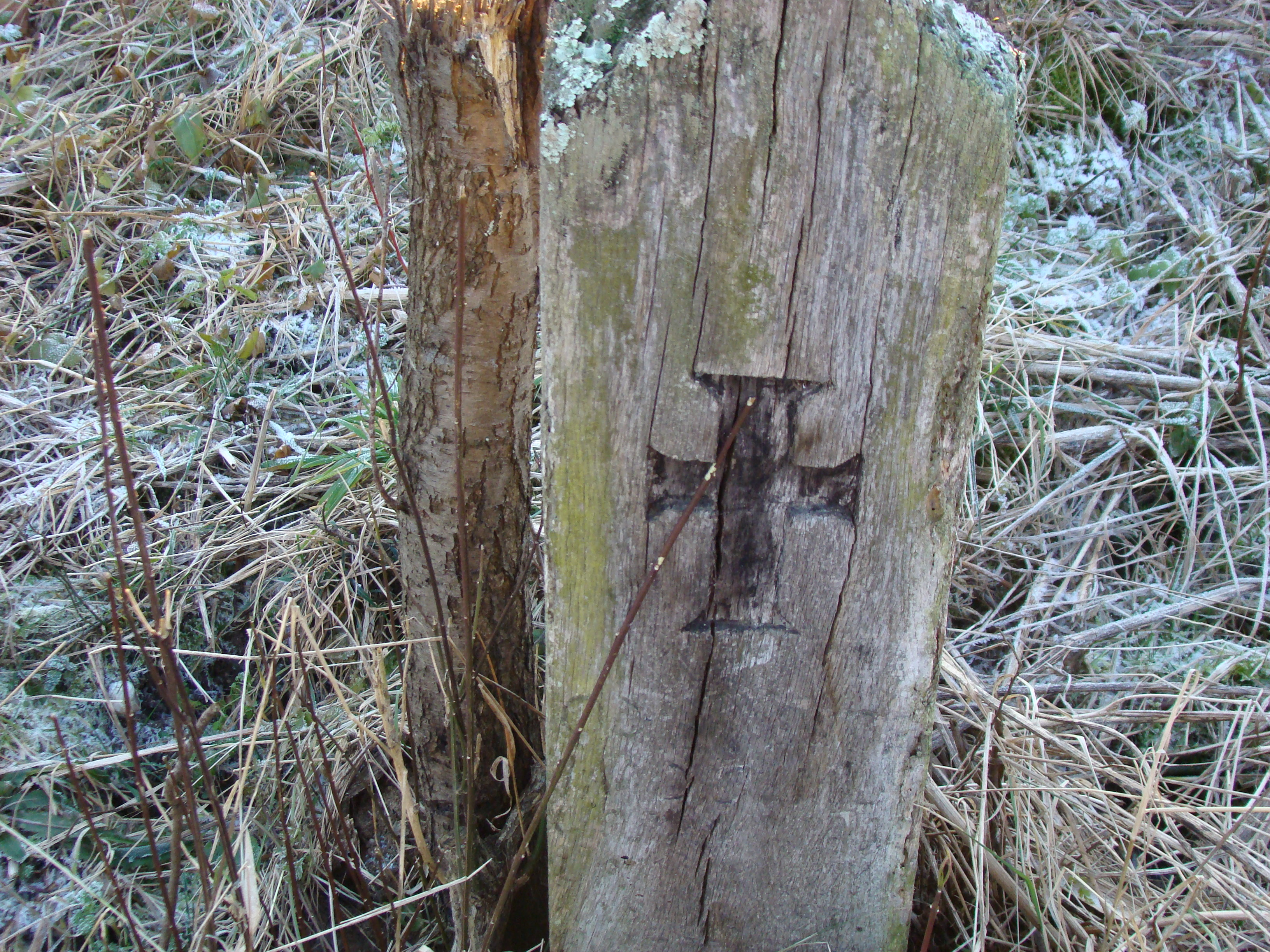 Biserica de lemn „Sf. Arhangheli” din Sânmihaiu Almașului, județul Sălaj